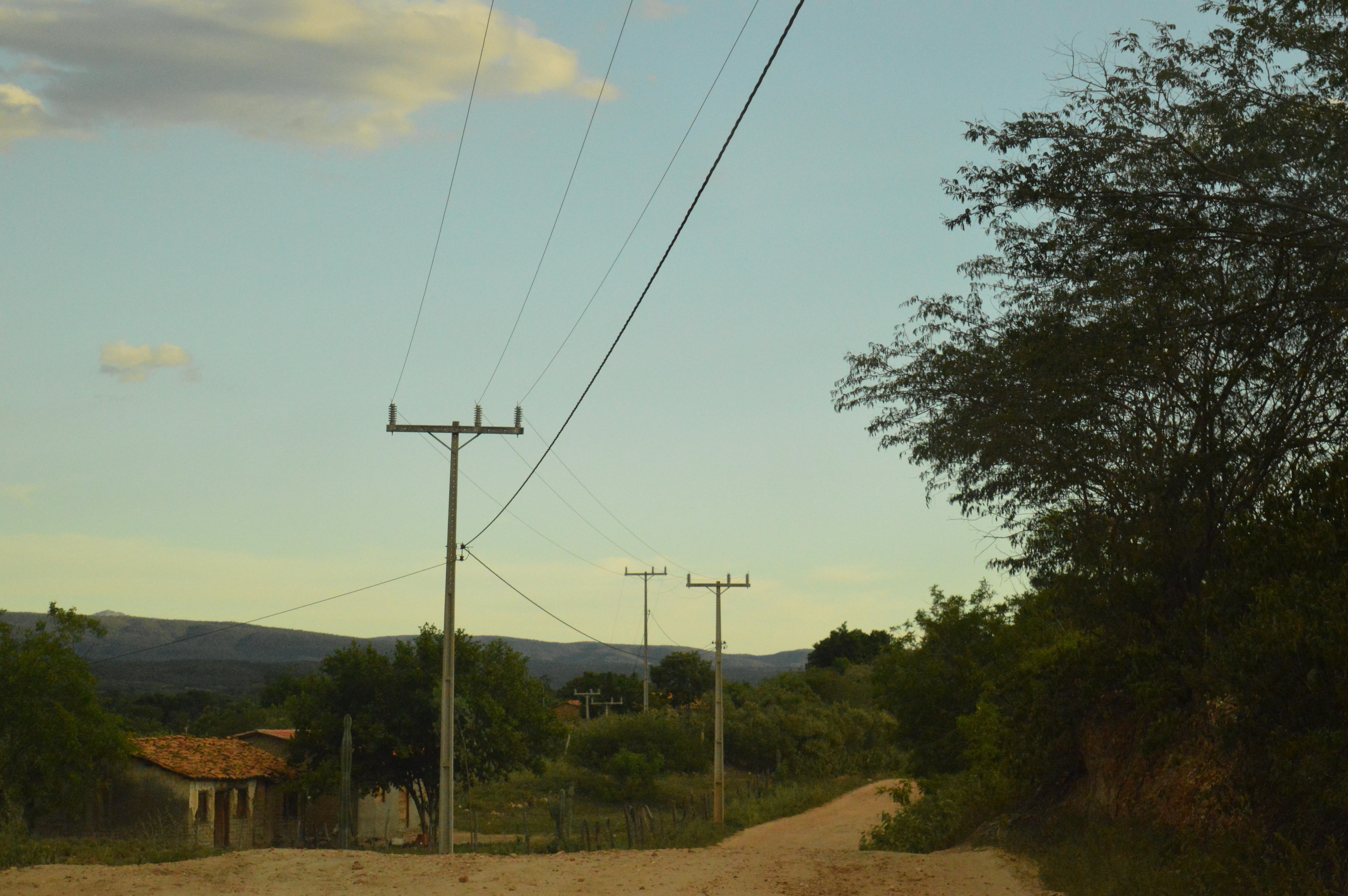 Vista do povoado Agreste, localizado na cidade de Paratinga. Foto de 25 de janeiro de 2017.